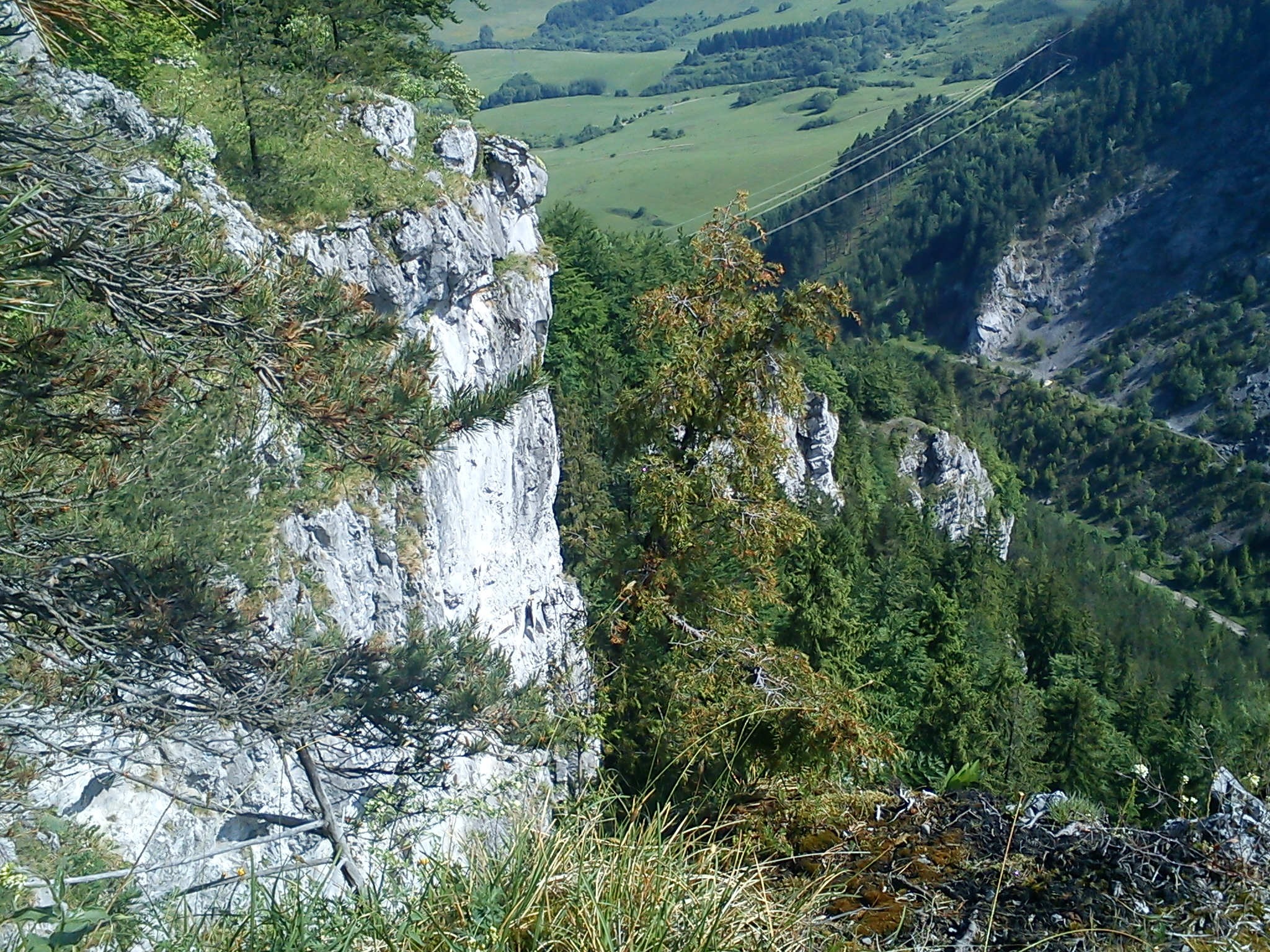 Začiatok Višňovskej doliny